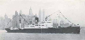 Die Buarque des Lloyd Brasileiro, das erste brasilianische Schiff, das durch ein deutsches U-Boot im Zweiten Weltkrieg versenkt wurde